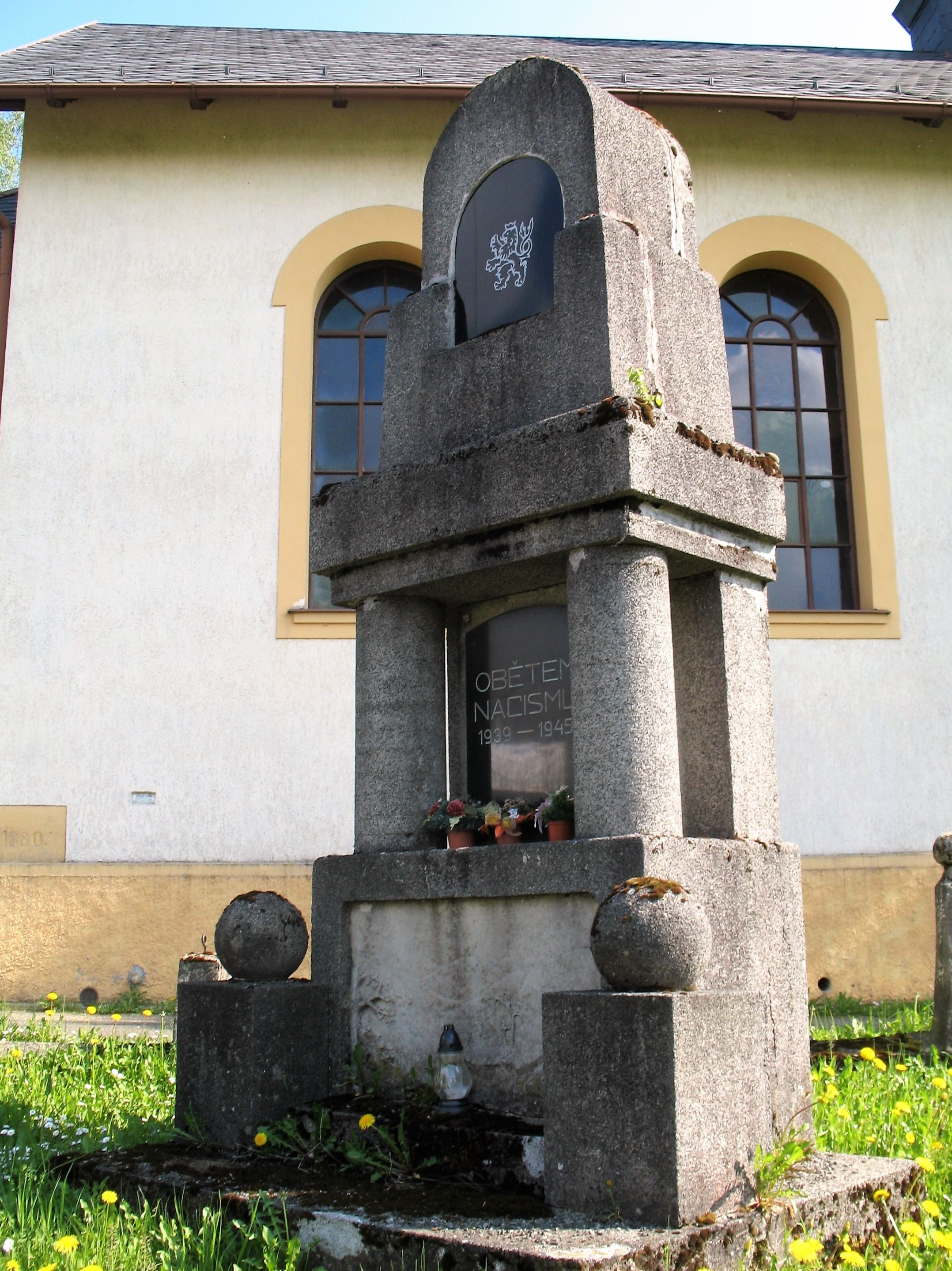 Černý Potok v Krušných horách, domy a krajina kolem silnice č. 224. Pomník obětem nacismu